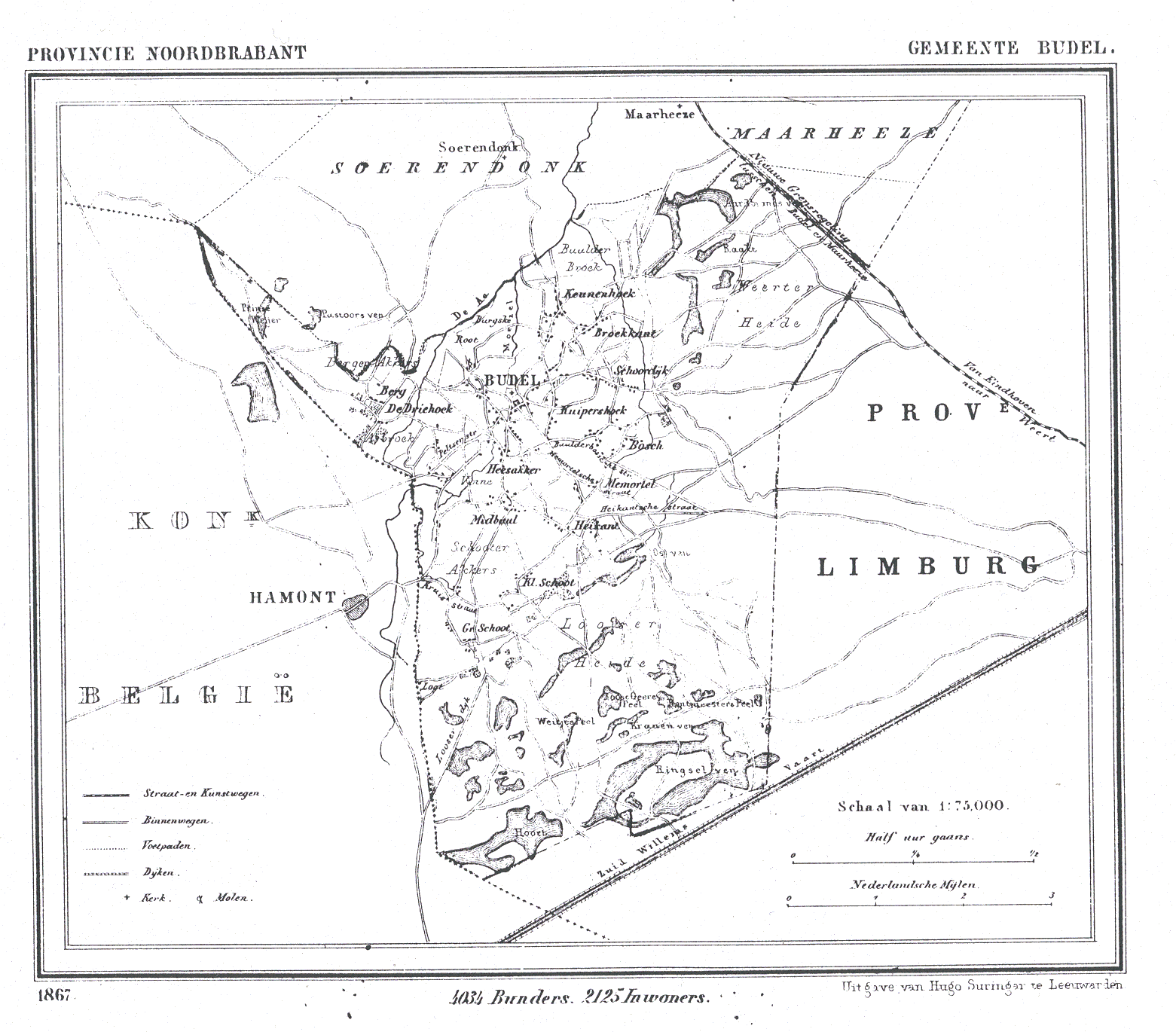 Nederland, Noord-Brabant, Gemeente Budel